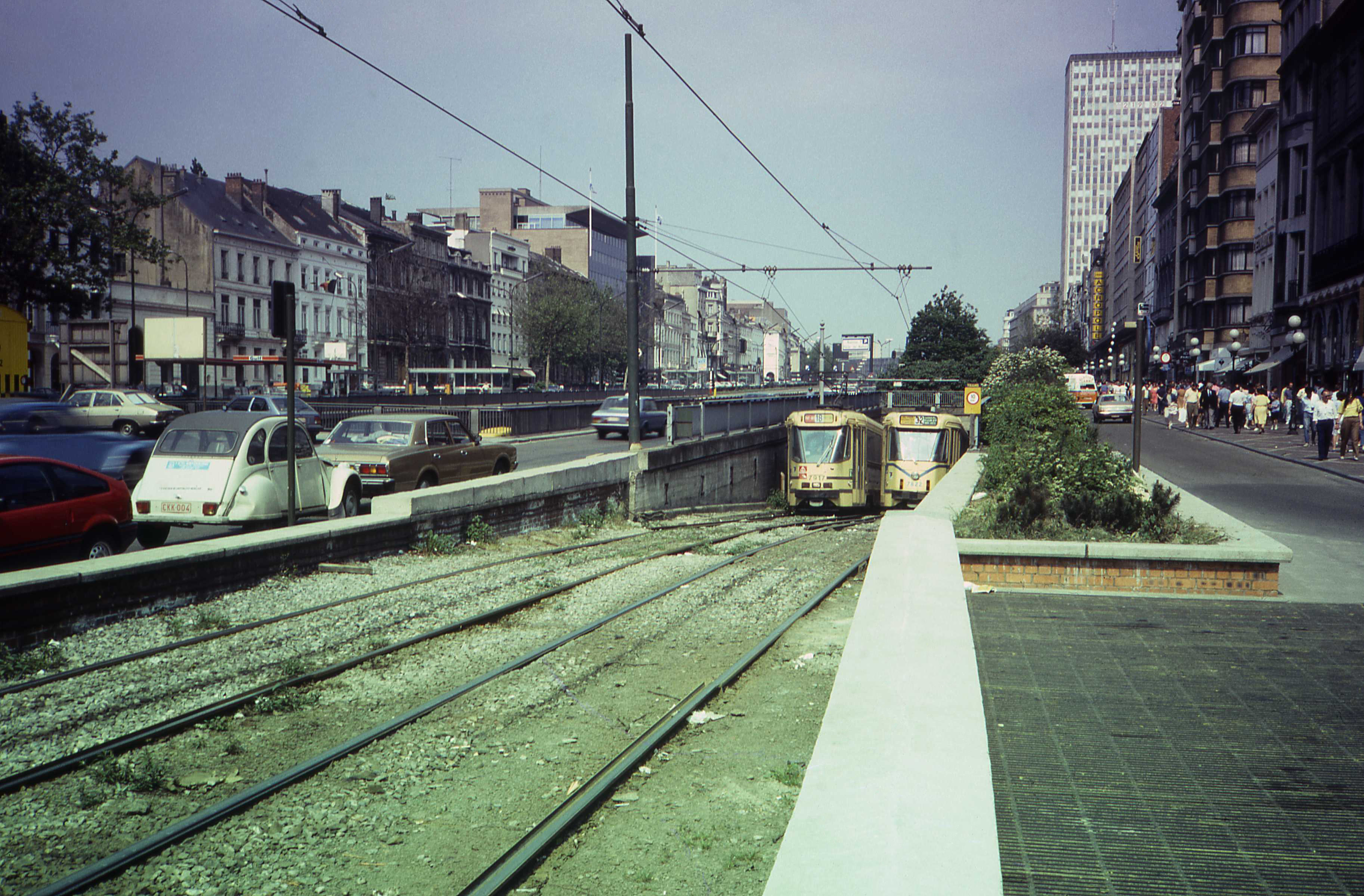 Ingang premetrotunnel tussen Naamsepoort en Louizapoort. Bestaat nu niet meer.